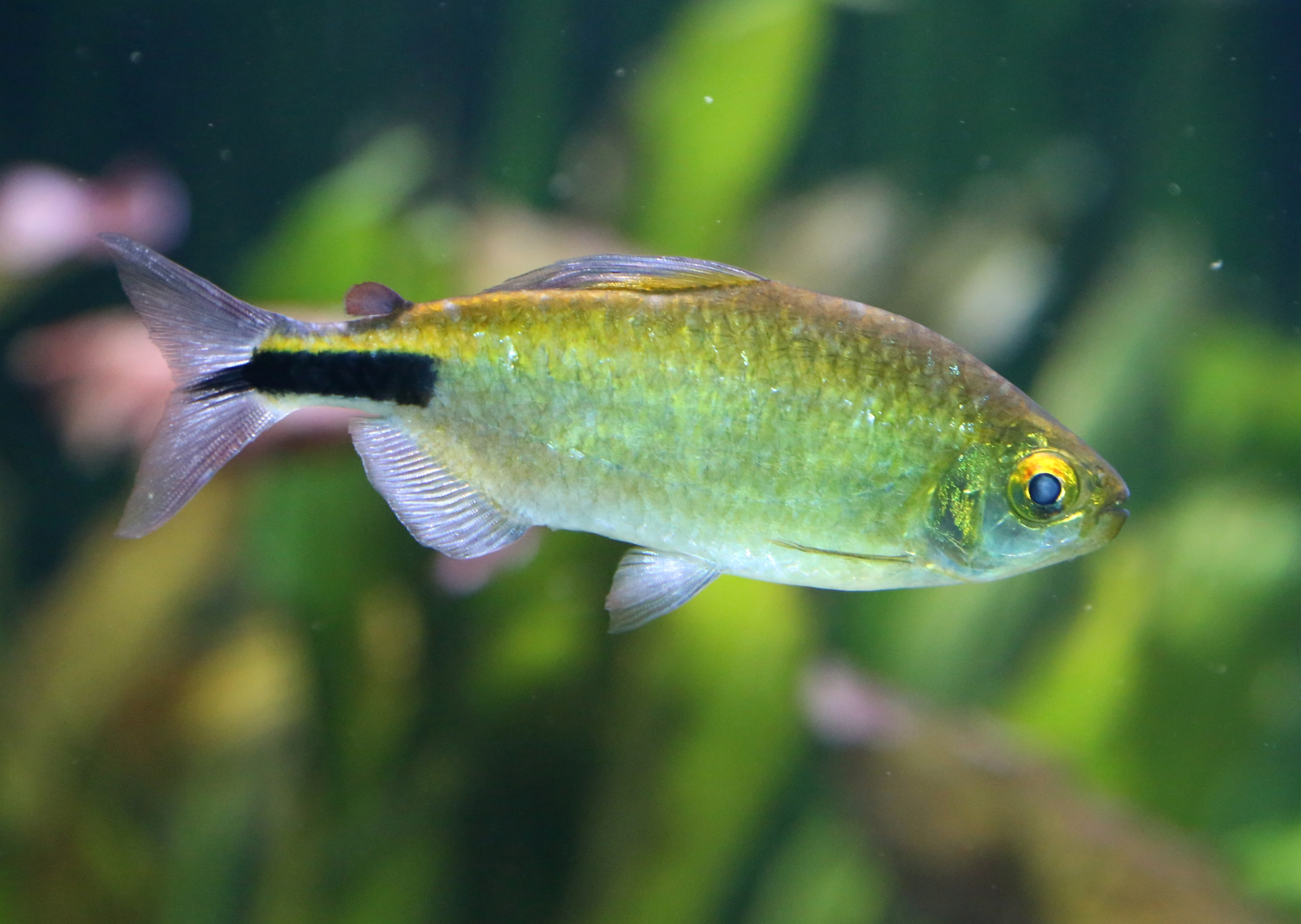 Langflossensalmler (Brycinus longipinnis), Tierpark Hellabrunn, München